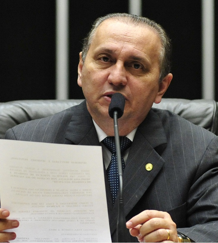 Antônio Jácome em novembro de 2016.